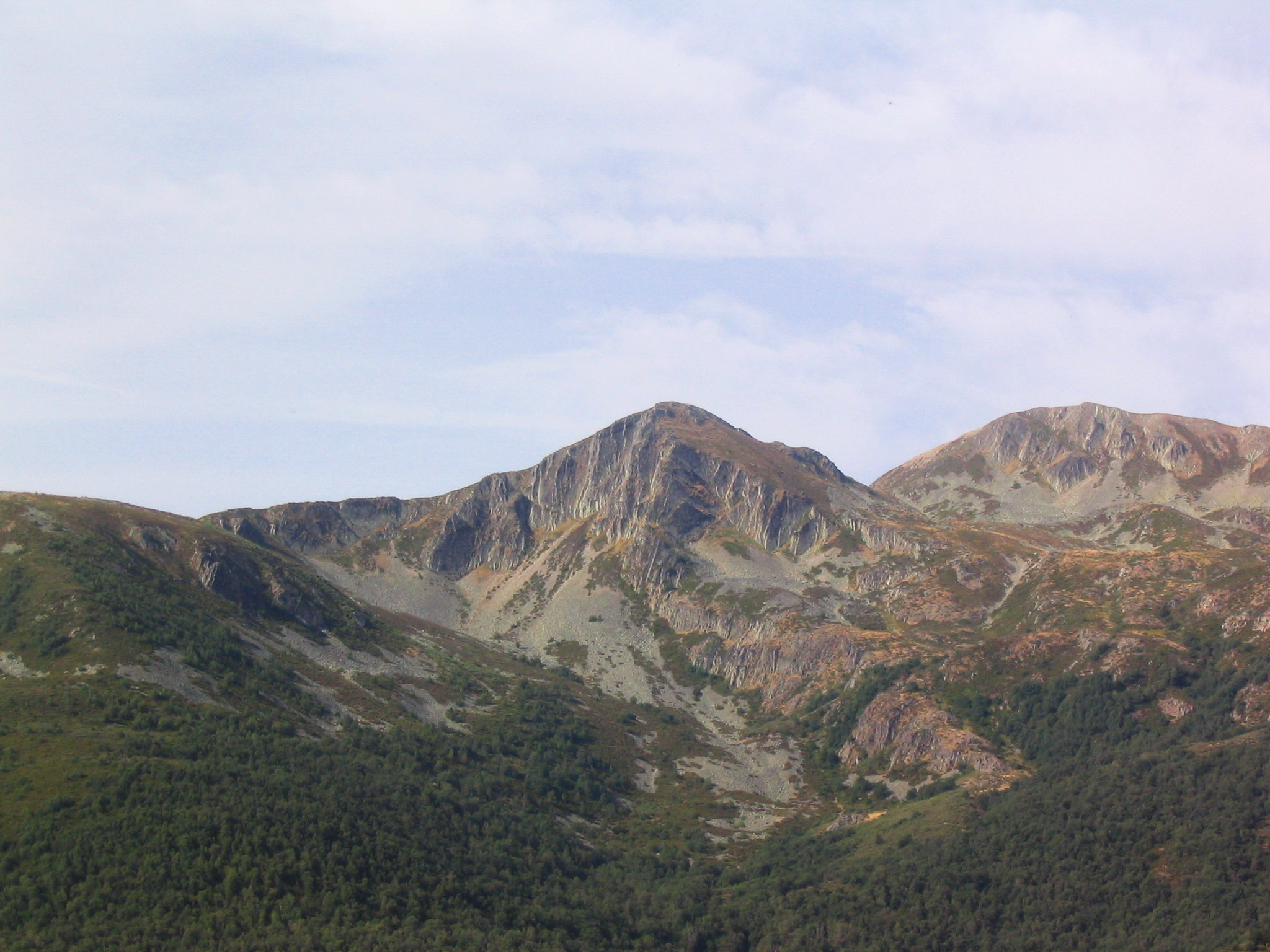 Vista de Peña cefera desde Las Chanas. Vegapujín, León, España.